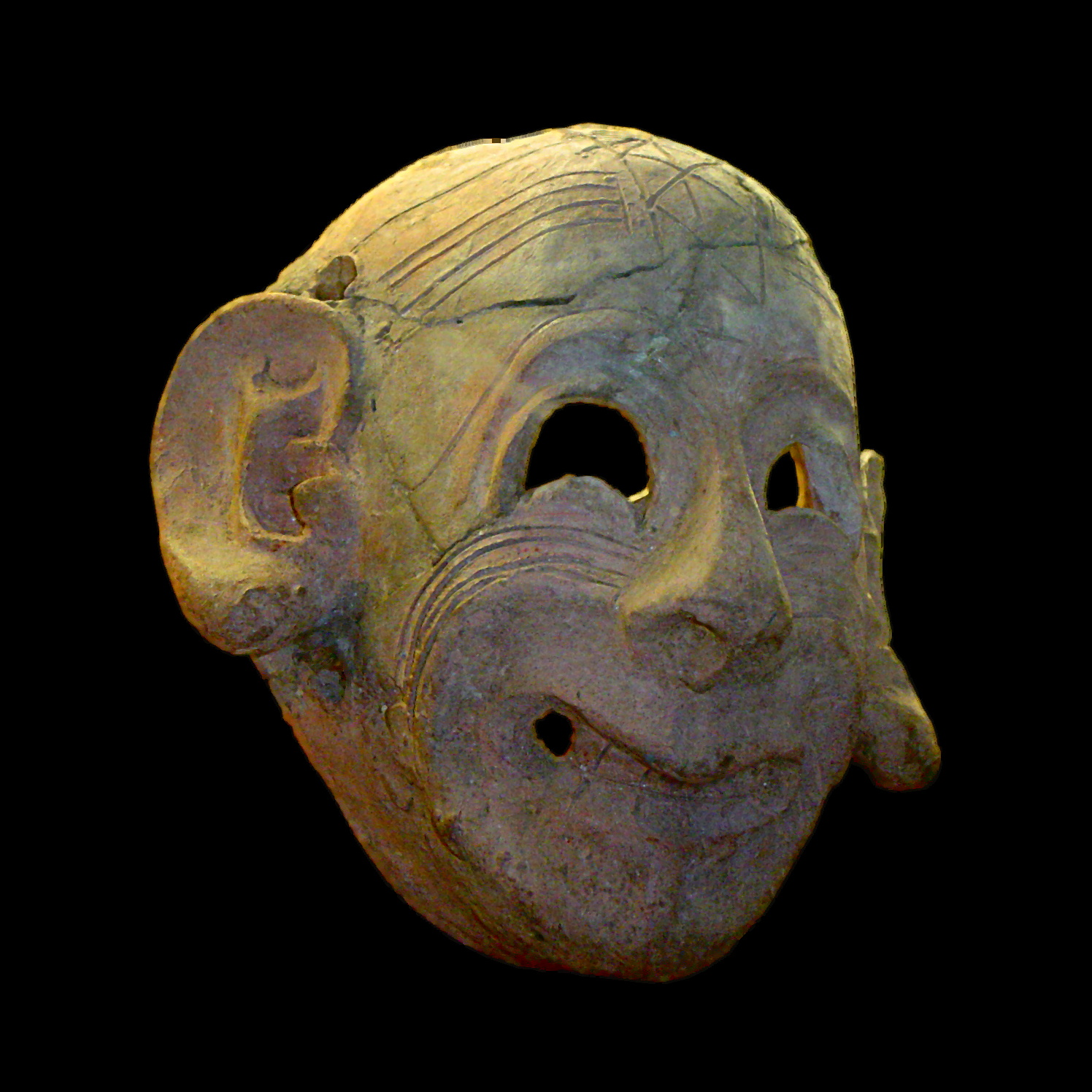 Maschera fenicia in terracotta al Museo del Bardo, in Tunisia.